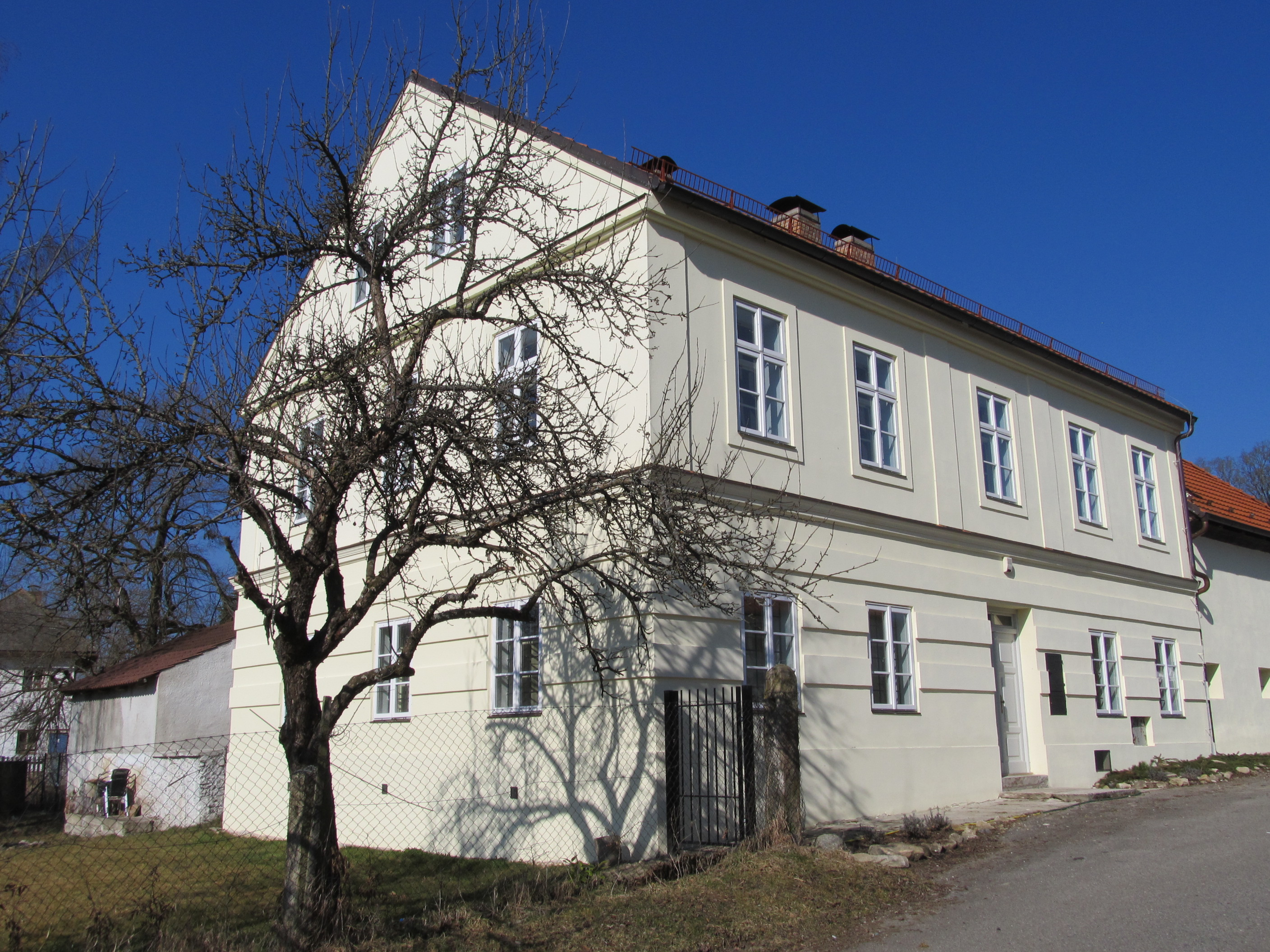 Pěkná - bývalá fara